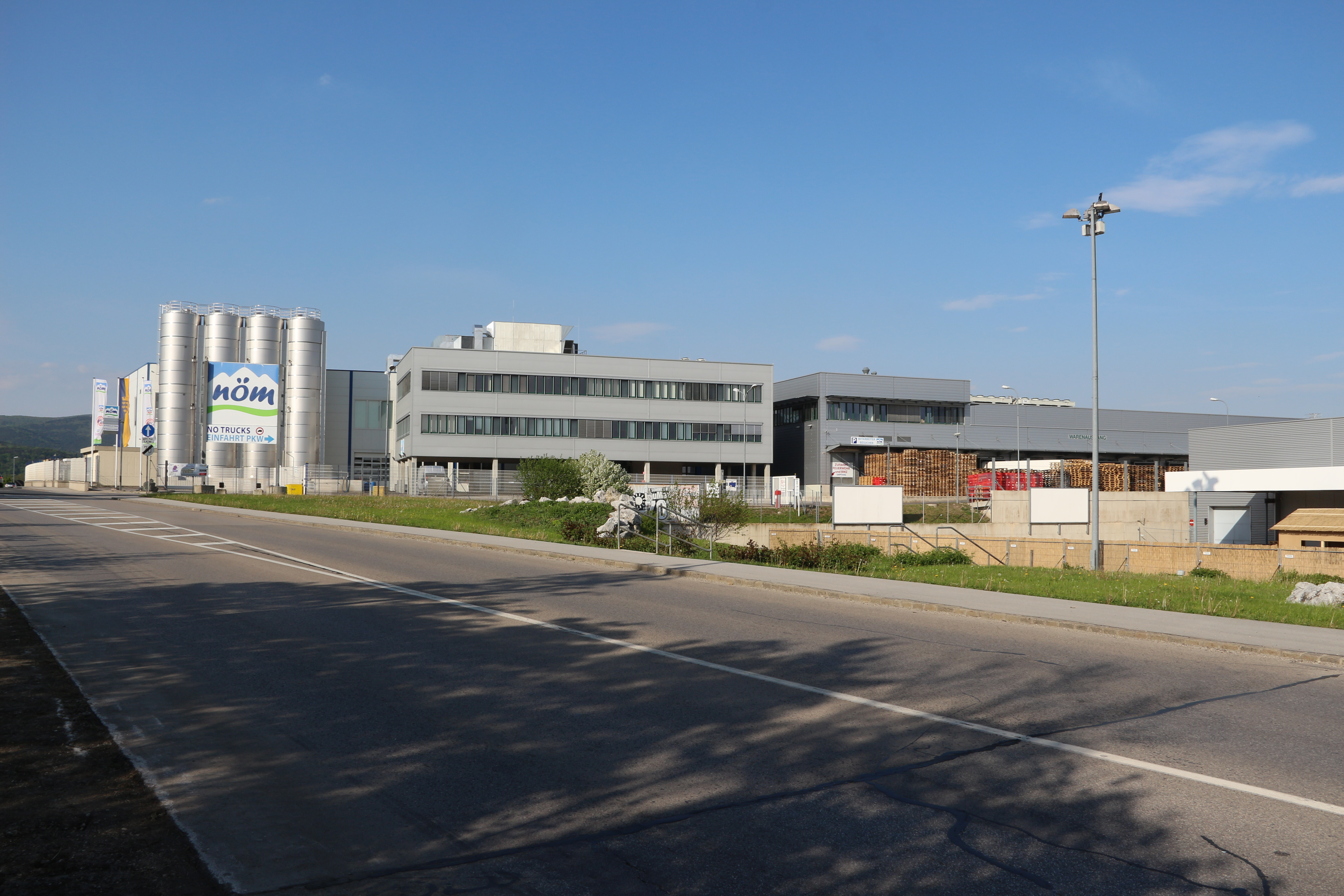 Hauptsitz der Niederösterreichischen Molkereien (NÖM) in Baden, Niederösterreich.